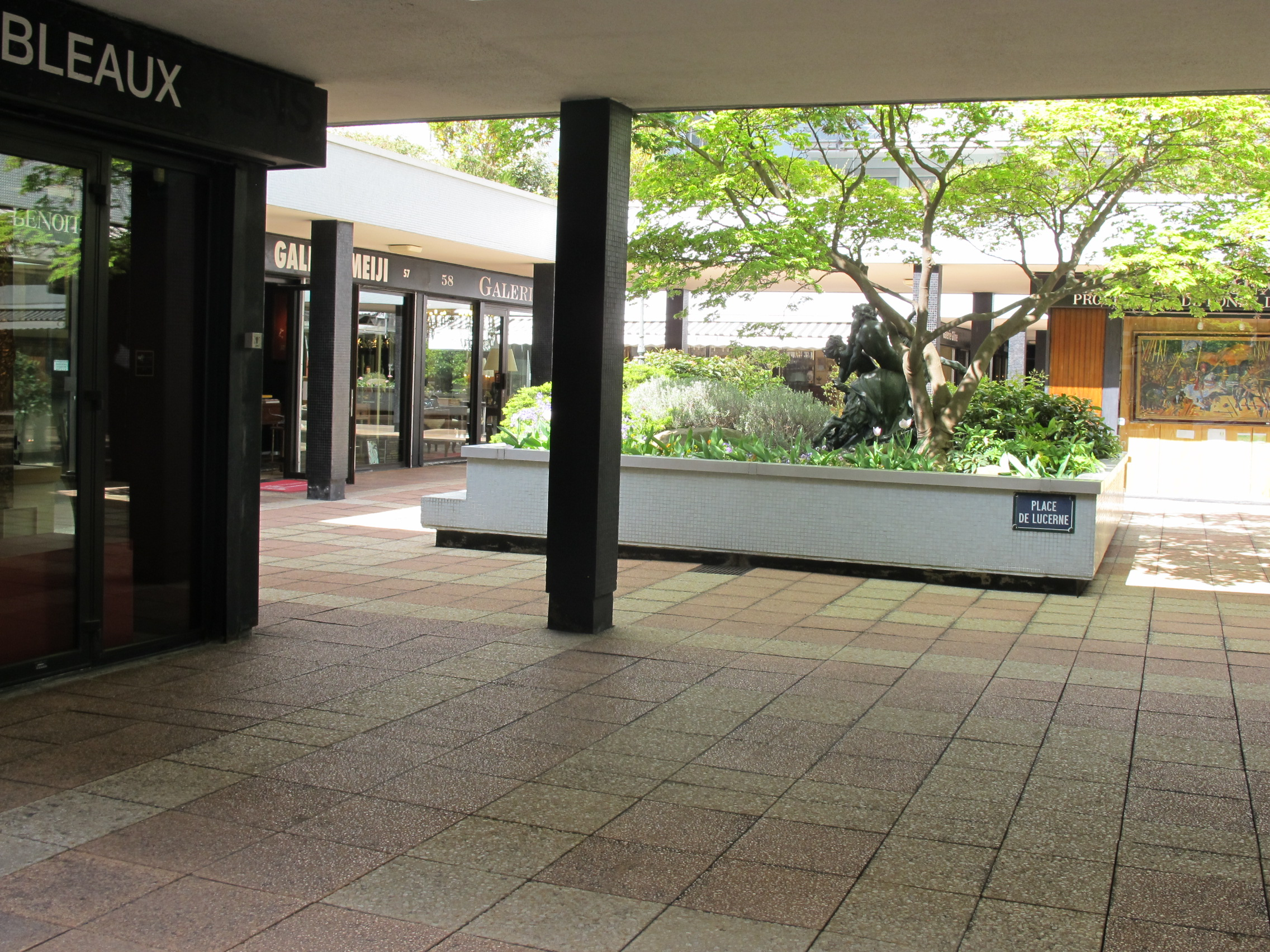 Village Suisse (Paris)